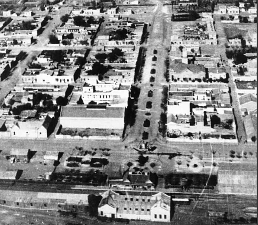 Centro de Trelew en 1930, se ve la estación en su apogeo